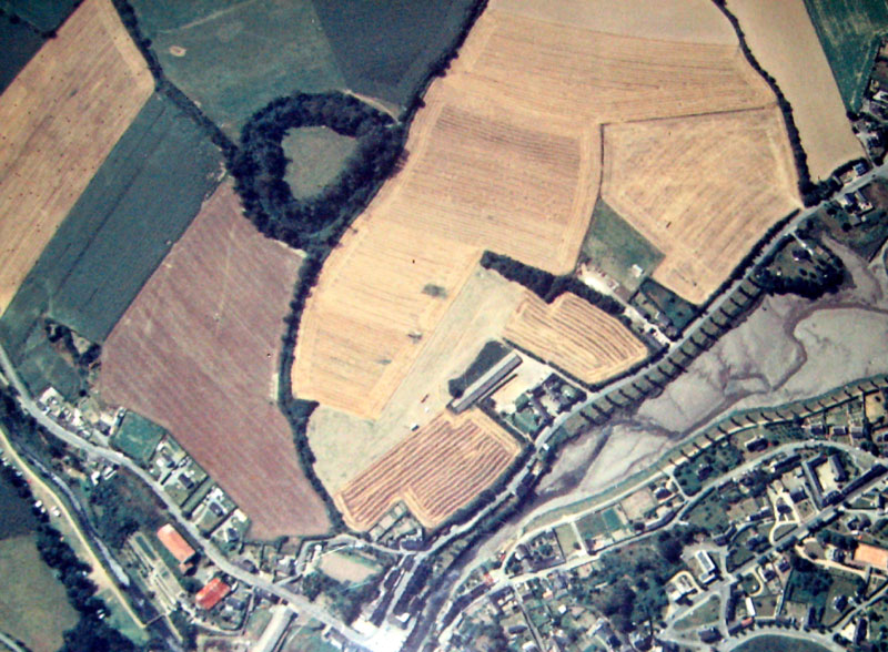 Langoad Kastell-Du diouzh an aer